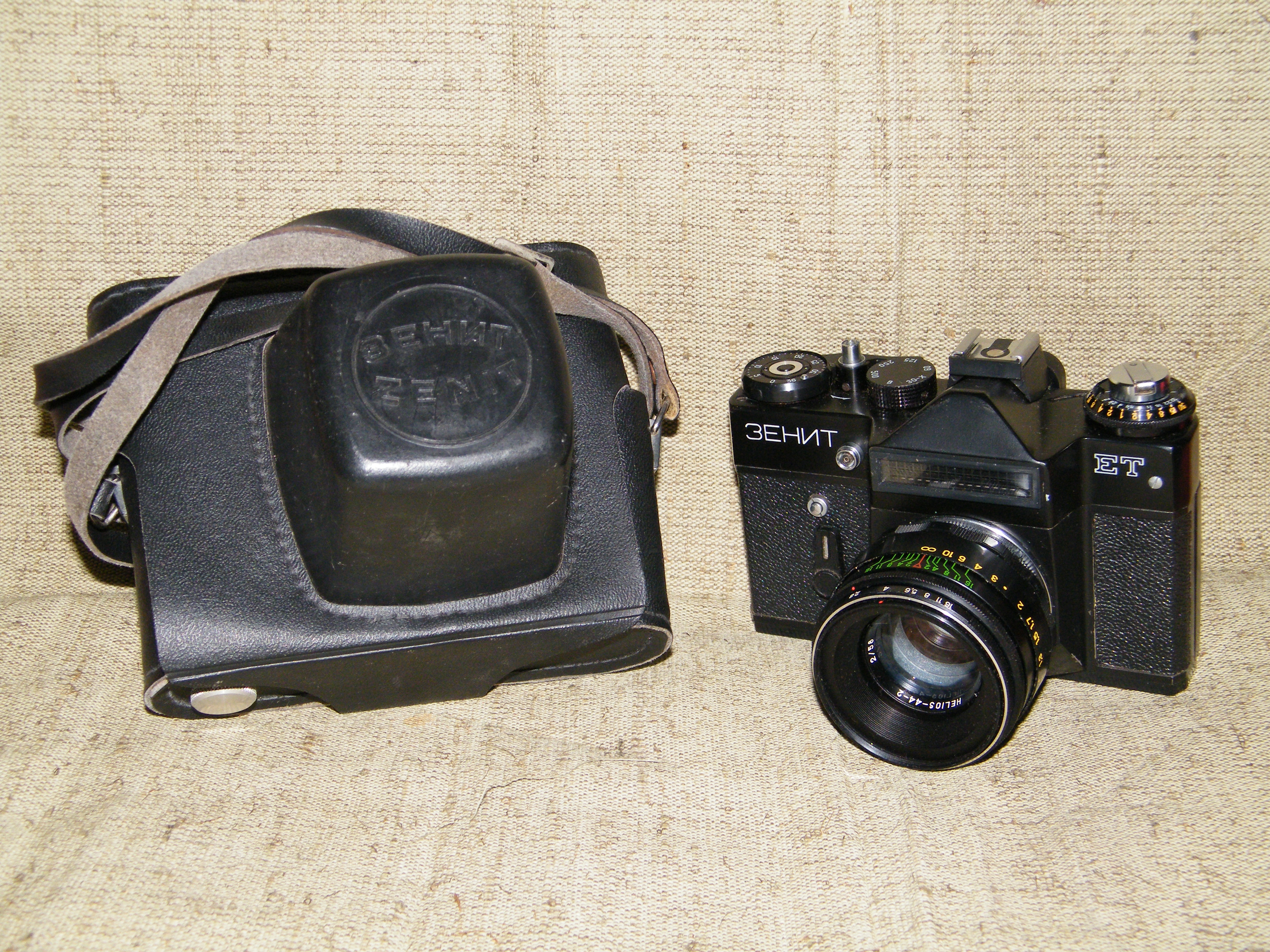 "Зенит-ЕТ" (1990) и футляр